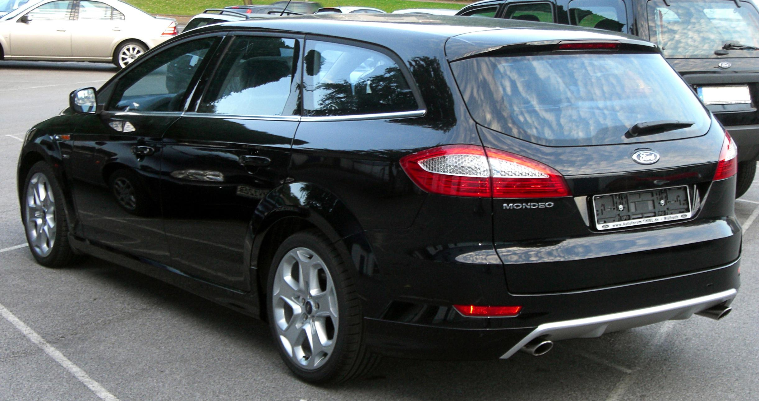 Ford Mondeo Turnier 2.5T